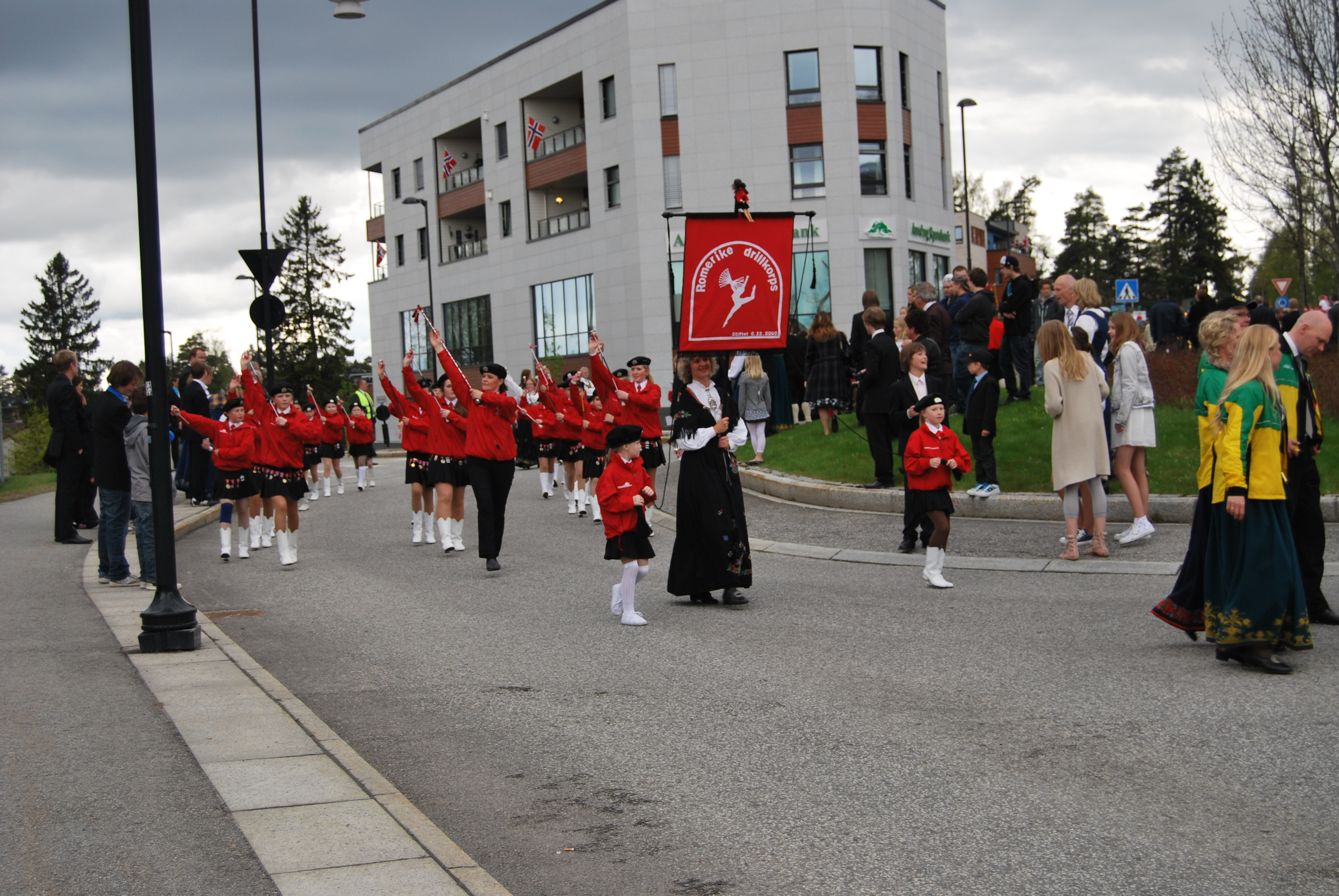 Jessheim. Parada 17 maja 2010.